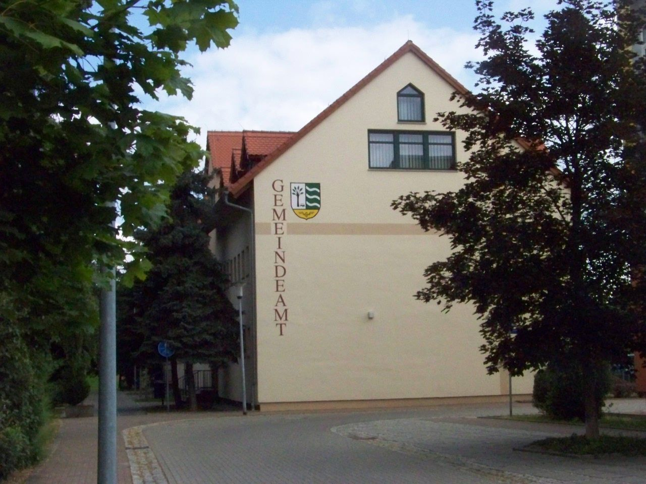 Gemeindeamt Neukieritzsch